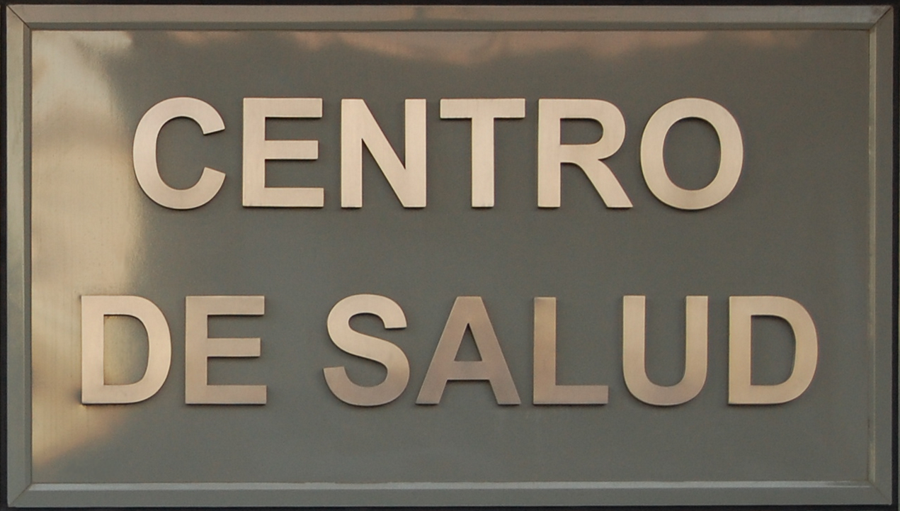 Cartel de un centro de salud del Servicio Madrileño de Salud de Madrid (SERMAS). Fotografía tomada en el centro de salud Miguel de Cervantes en Alcalá de Henares (Comunidad de Madrid - España).